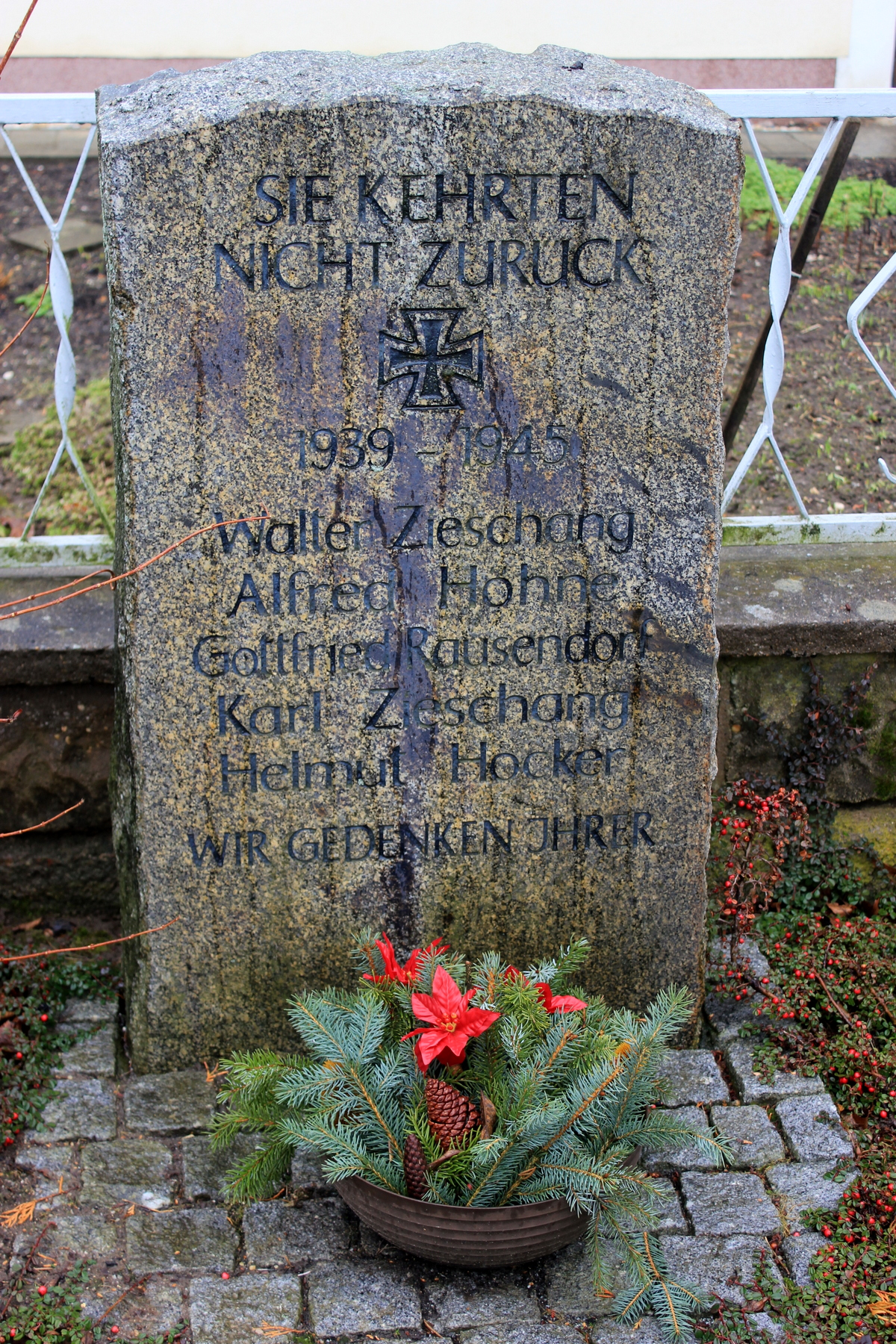 Hornjoserbsce: Wojerski pomnik za padłych Druheje swětoweje wójny w Myšecach.